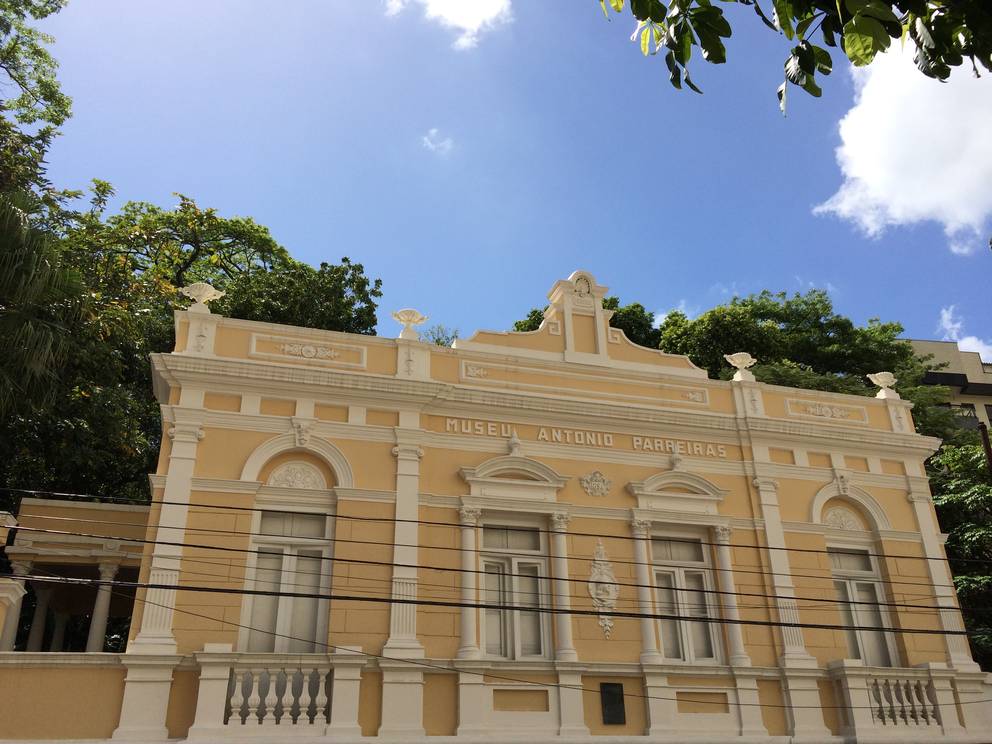 Edifício-sede do Museu Antônio Parreiras, à rua Tiradentes, nº 47, em Niterói, incluindo toda a área arborizada integrante da mesma propriedade, com as dimensões e confrontações constantes da planta que instruiu o processo